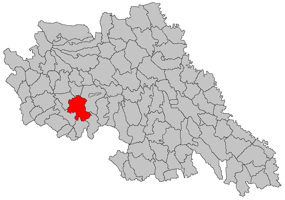 Categorie:Hărţi ale judeţului Iaşi